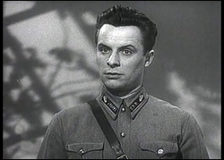 Евгений Самойлов в фильме «Сердца четырёх»